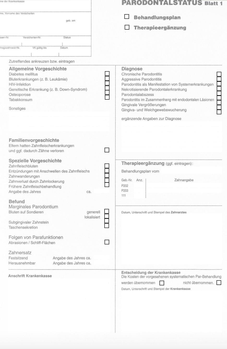 Offizieller Parodontalstatus als Antrag für die gesetzlichen Krankenkassen in Deutschland